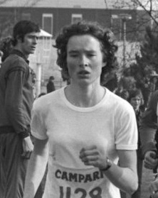 Lenie van der Poel, deelneemster aan het Nationale veldkampioenschap te Westerhoven in 1977.